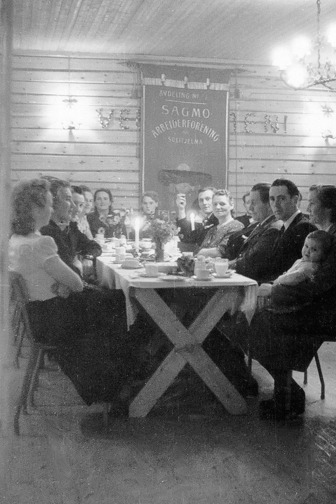 Celebration at Sagmo Arbeiderforening (1953)